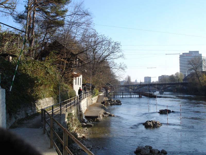 Unterer Letten, flussaufwärts gesehen, mit Eisenbahnbrücke „Lettenviadukt“ und Migros-Zentrale im Hintergrund